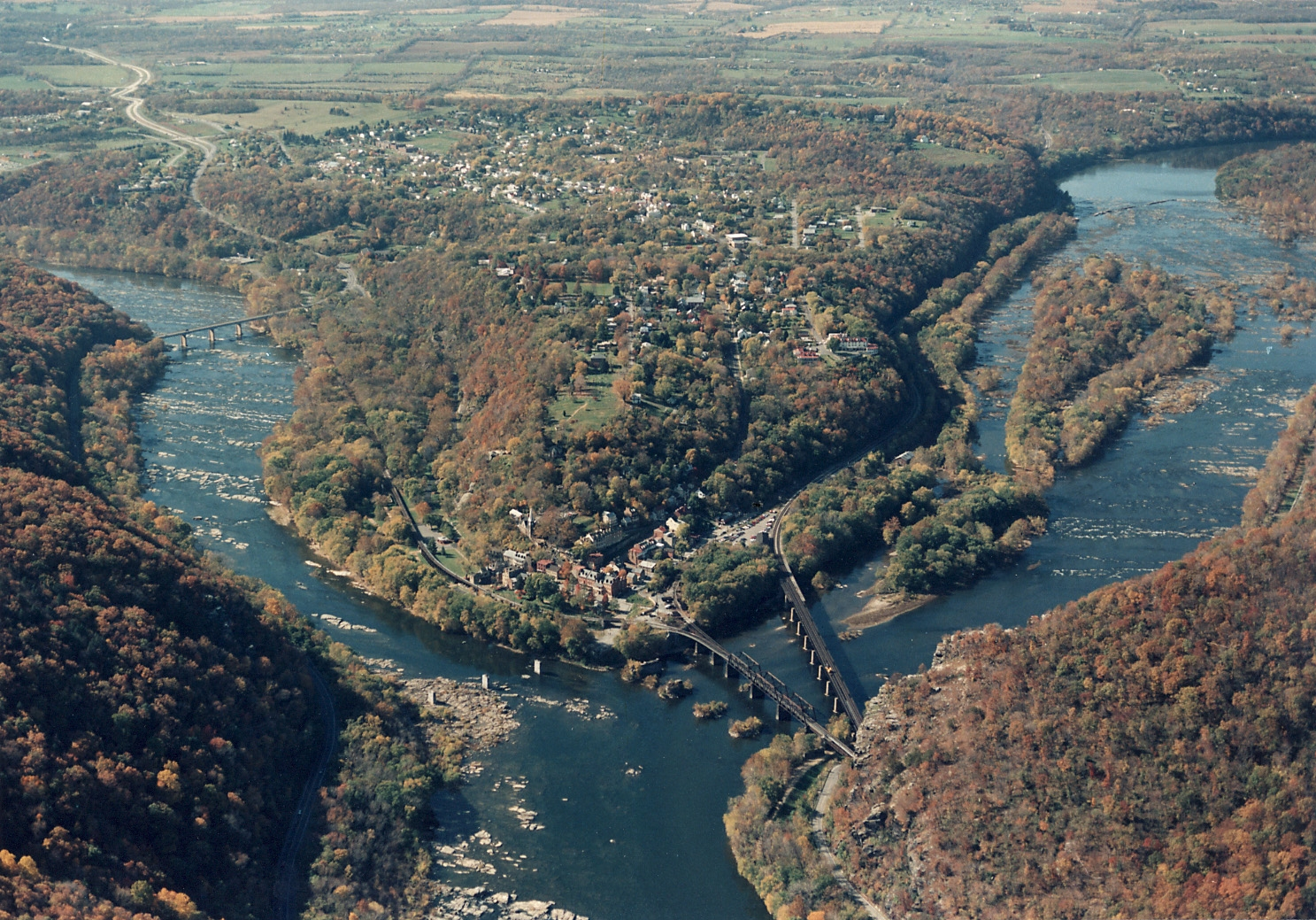 NPS Photo